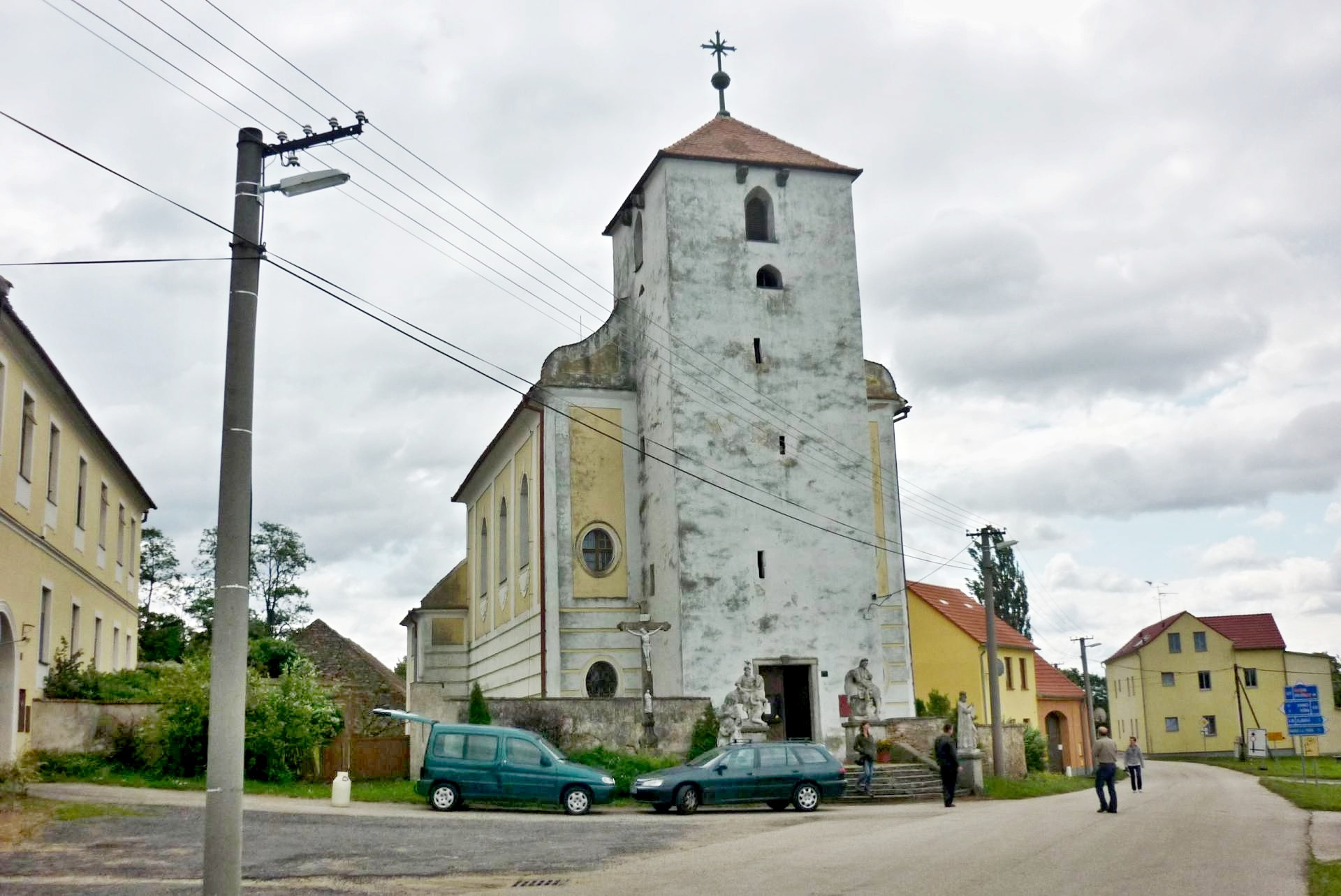 Farní kostel Nanebevzetí Panny Marie v Rancířově